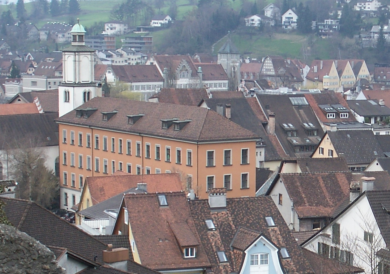 Feldkirch, ehem. Bundesgymnasium mit Turm der Johanniskirche